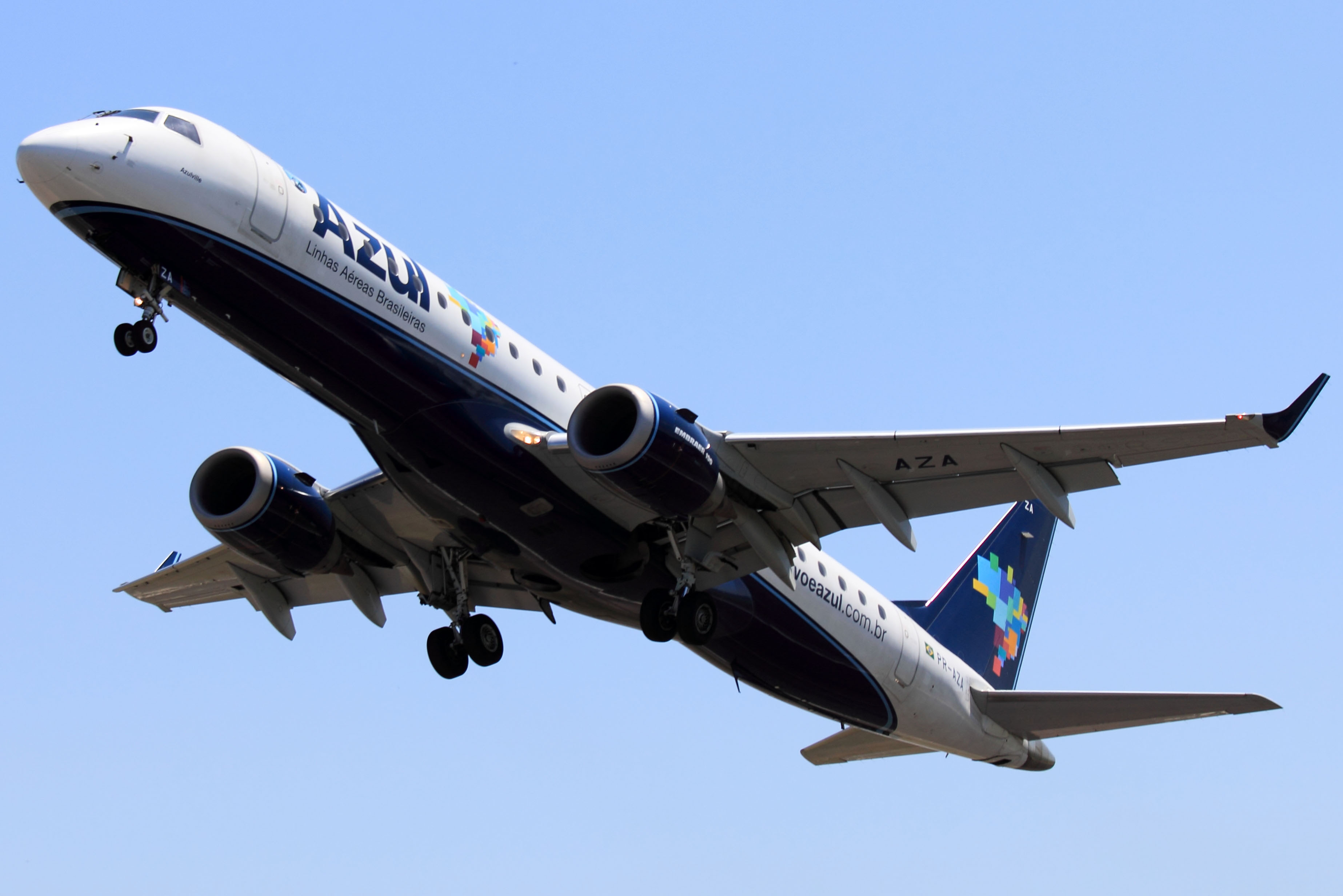 Azul - Linhas Aereas Brasileiras - Embraer ERJ-190-100IGW 190AR - PR-AZA